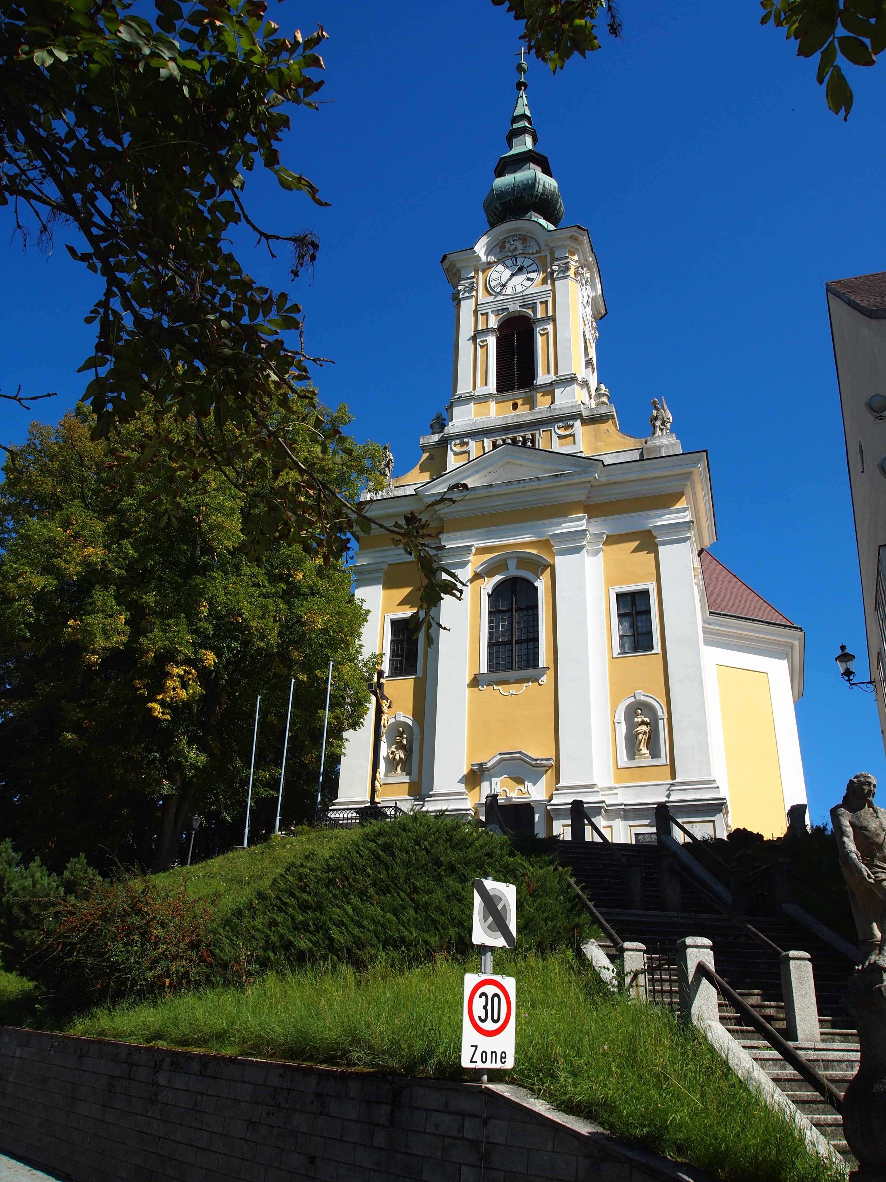 Kath. Pfarrkirche hl. Johannes der Täufer